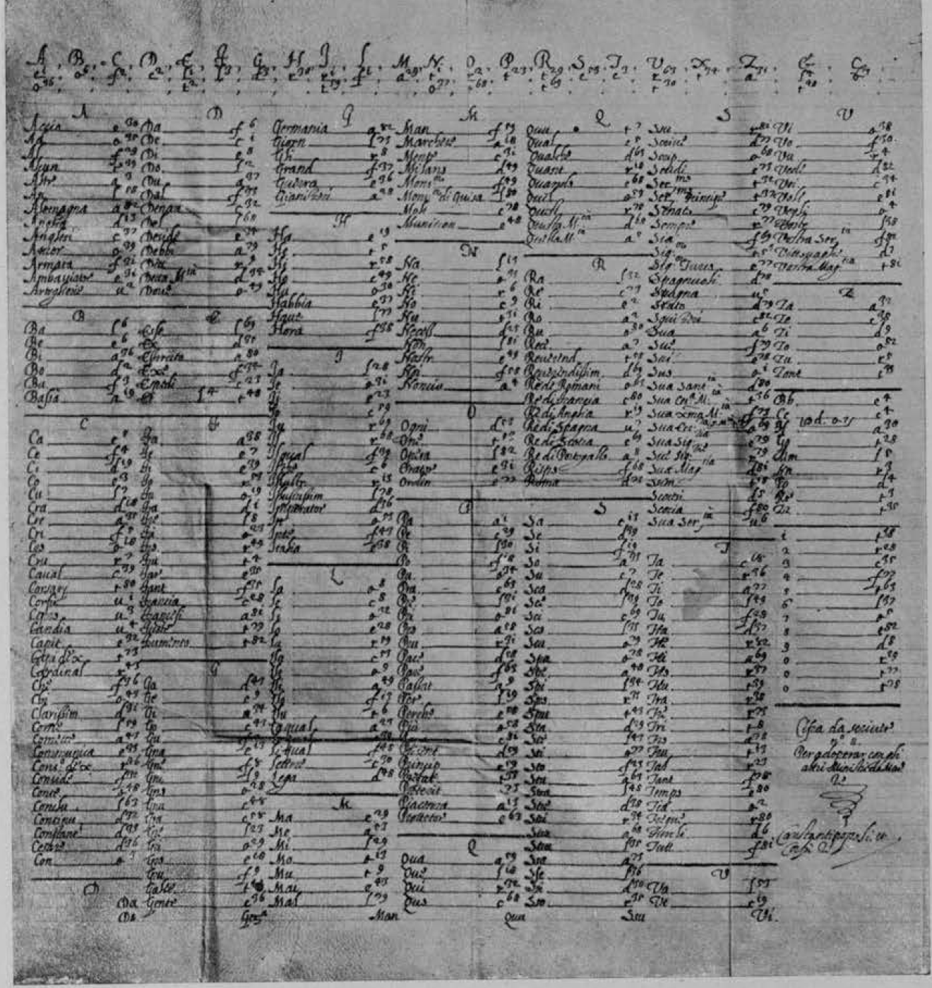 Cifrario usato dal bailo Marсantonio Barbaro